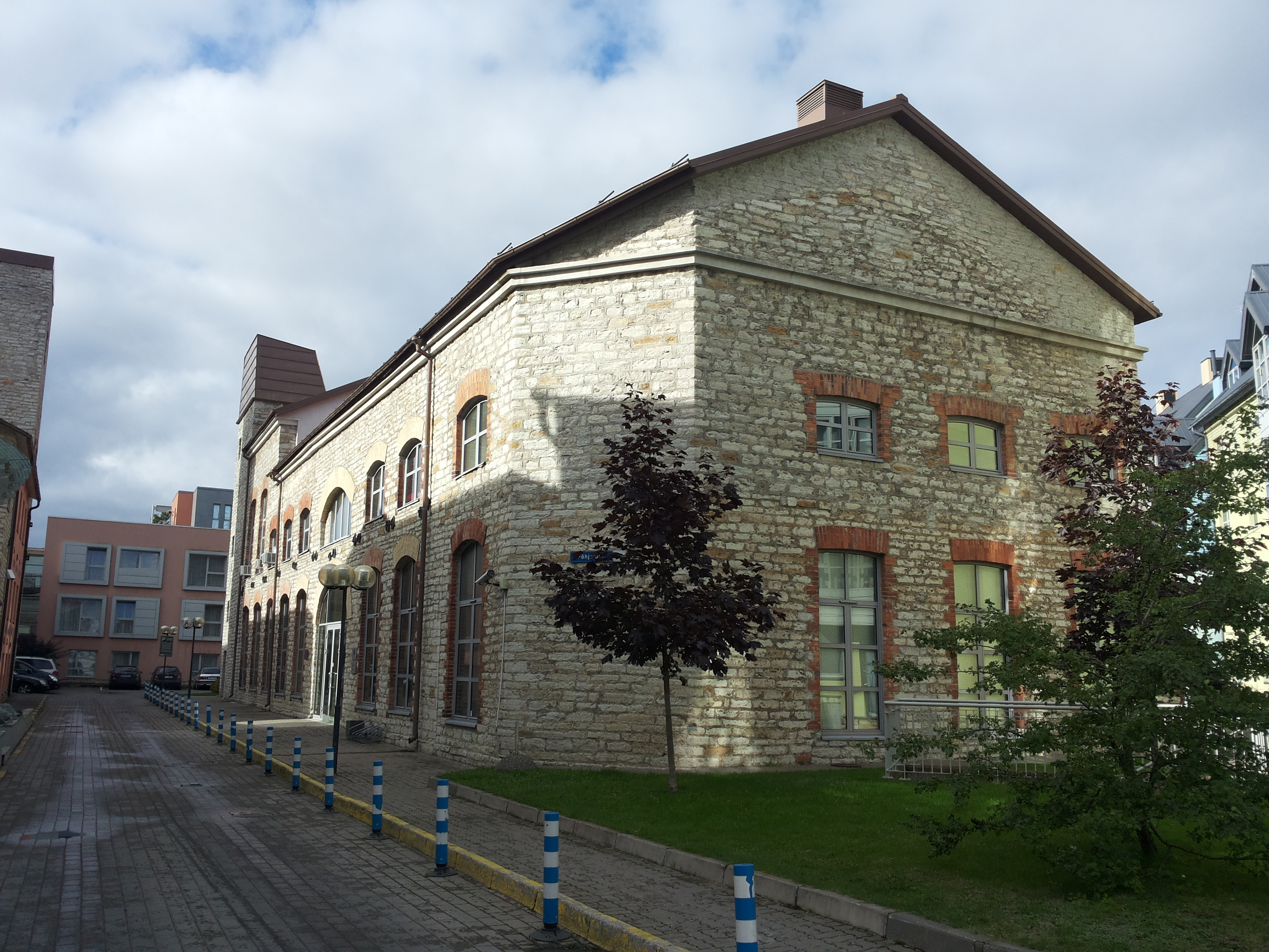 F. Wiegandi masinatehase valukoja lõunafassaad , 1881–1883